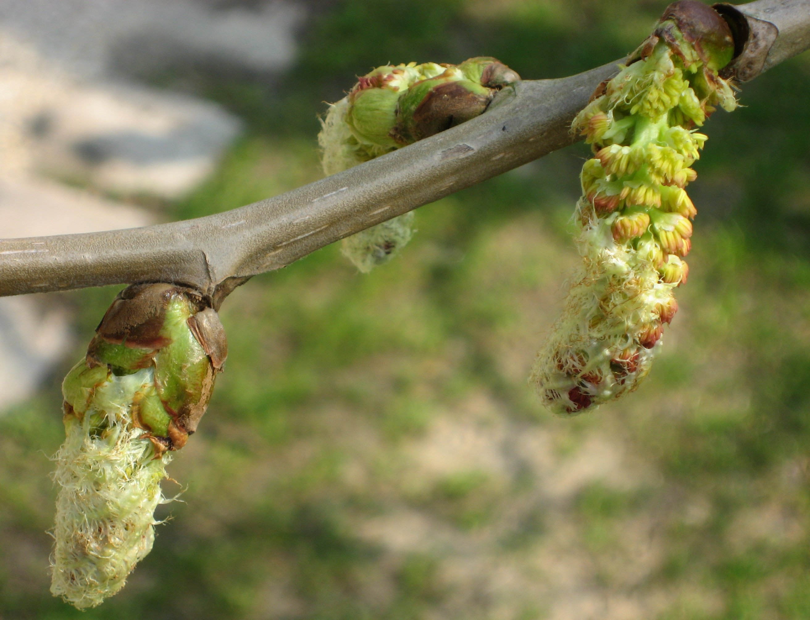 Chaton mal de Populus lasiocarpa Oliv (Peuplier de Chine) in Arboretum de la Vallée-aux-Loups Map: 48° 46' 22" N 2° 16' 5" E